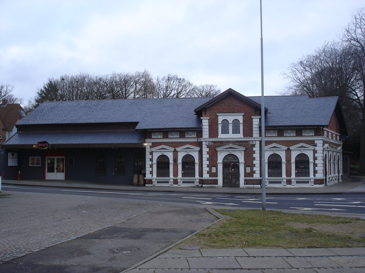 Jernbanerestaurationen ved Skive N set fra S